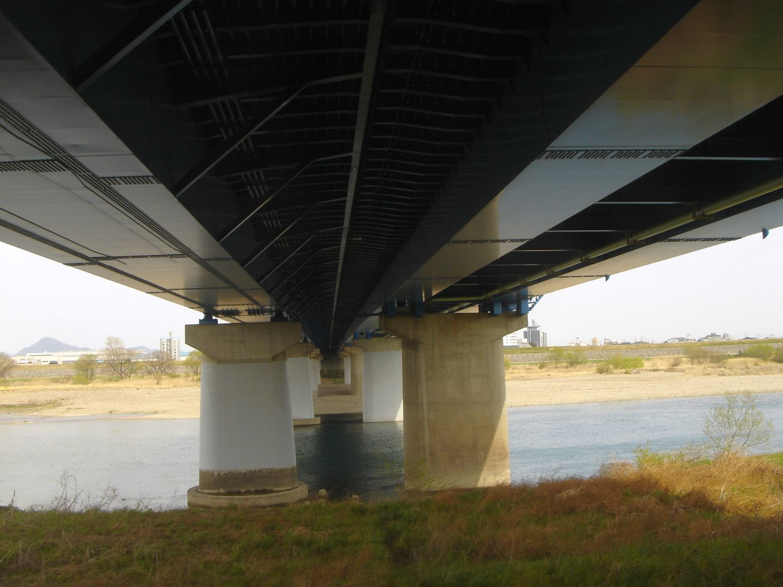 Hozumi-Ohashi(穂積大橋),Mizuho,Gifu,Japan(岐阜県瑞穂市)で右岸（西）側より撮影。左側が上流側。上流側と下流側では橋梁の構成が異なる。